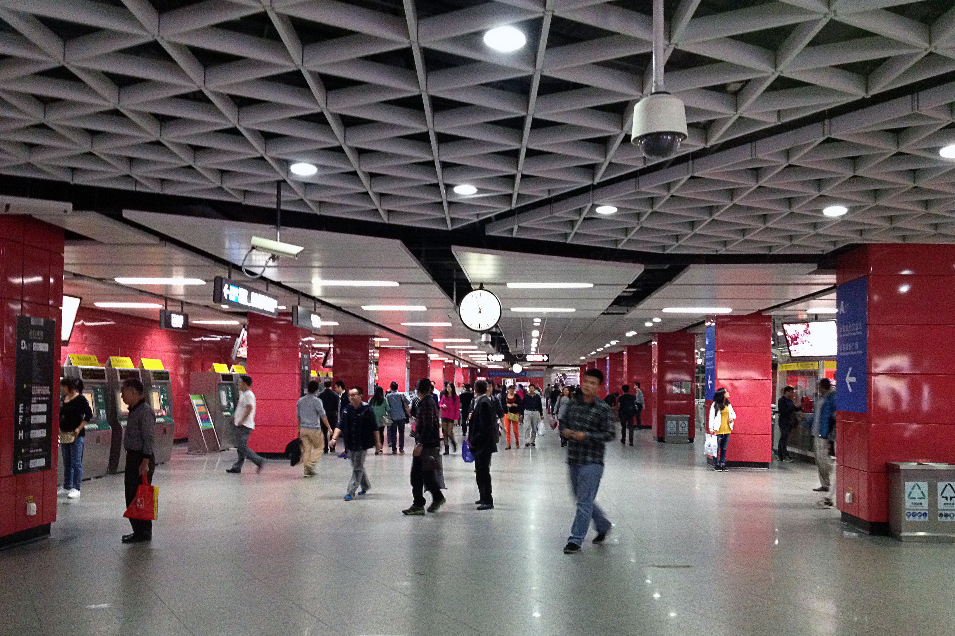 广州地铁5号线广州火车站站厅